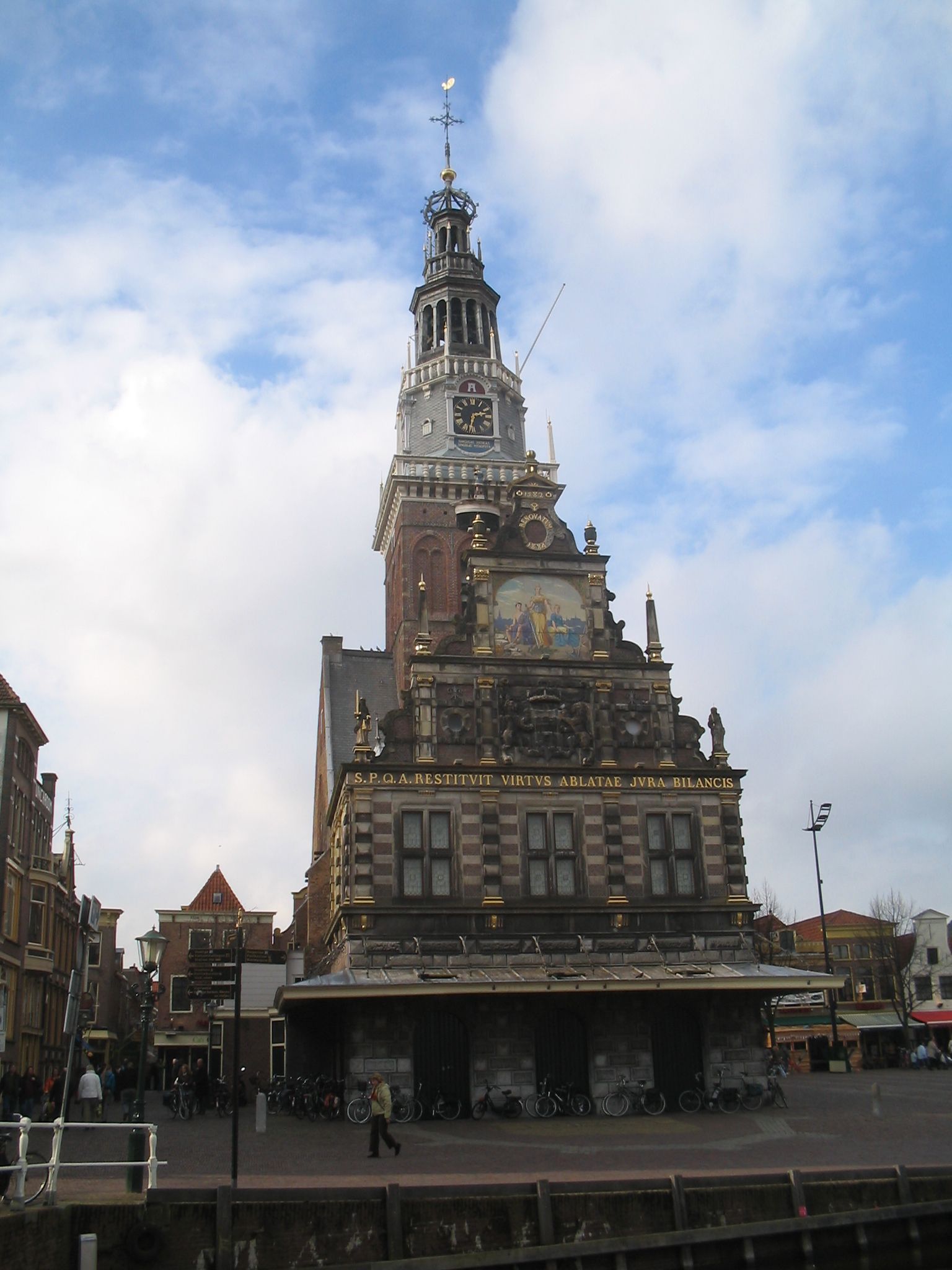 Alkmaar, waag, feb. 2006